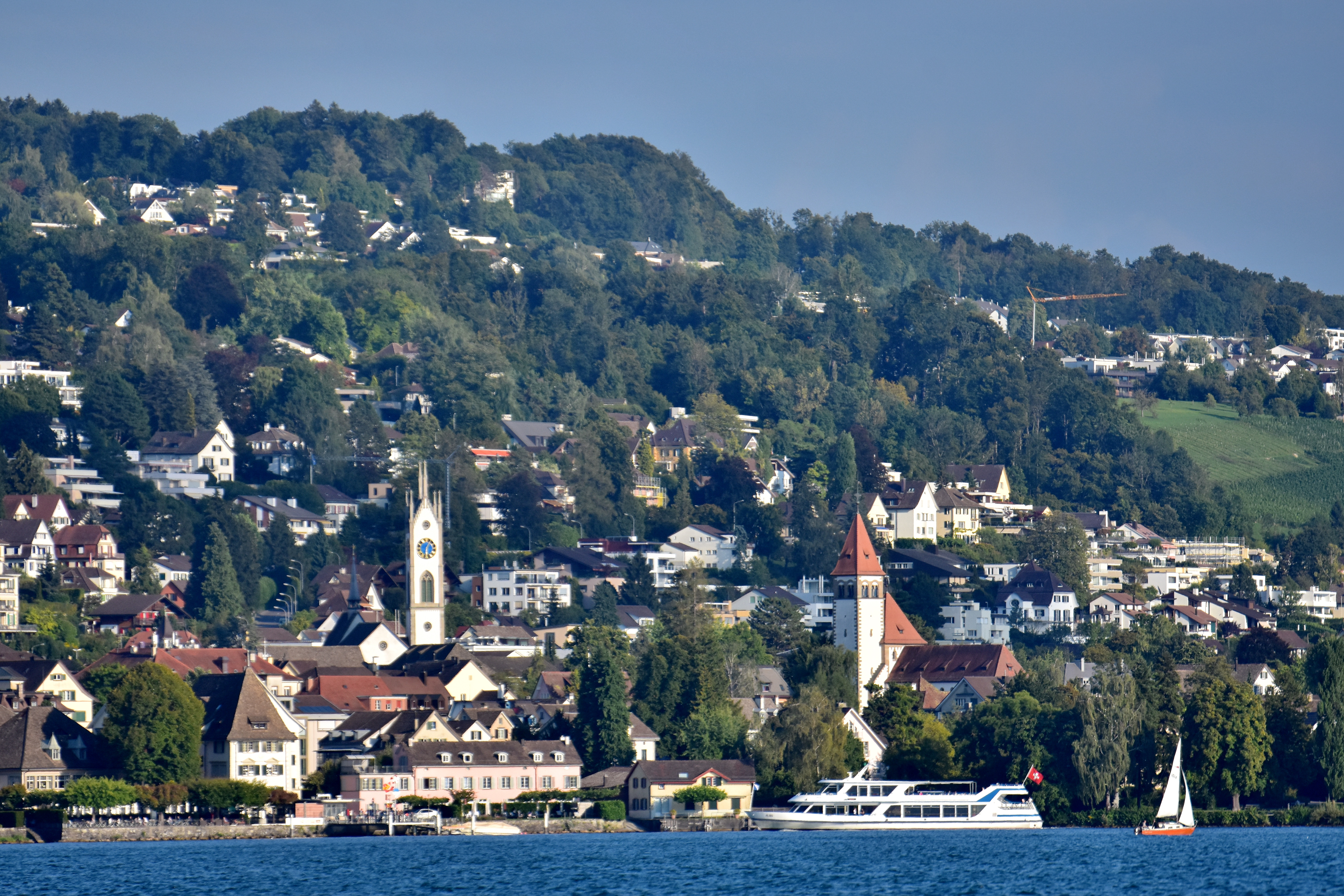 Küsnacht and Küsnachter Tobel, as seen from ZSG ship MS Helvetia on Zürichsee in Switzerland